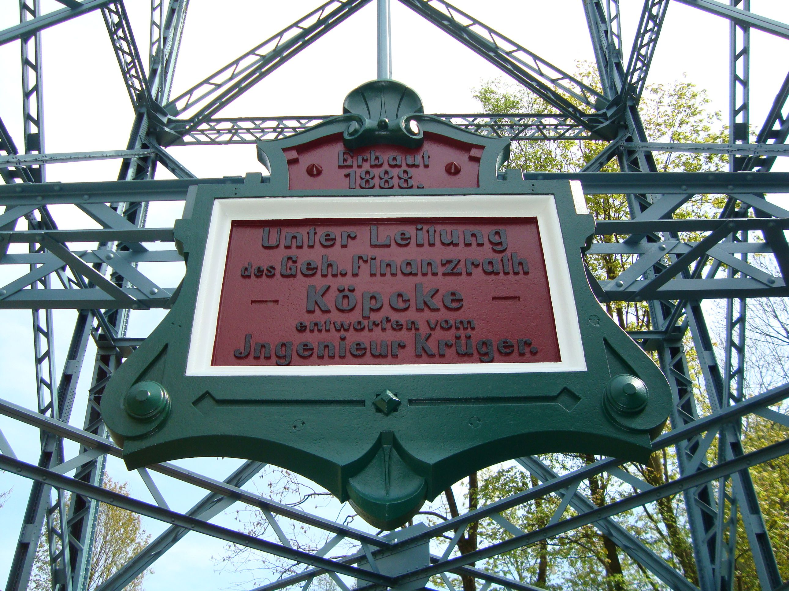 Tafel am Mittelpfeiler des Markersbacher Viadukts, die an die Erbauung der Brücke und die Erbauer erinnert